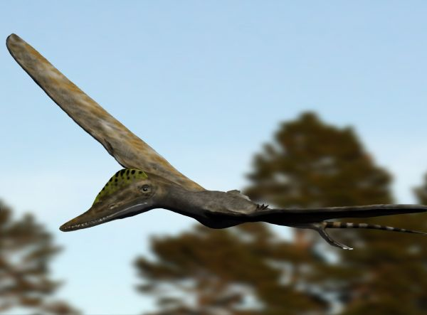 Wukongopterus